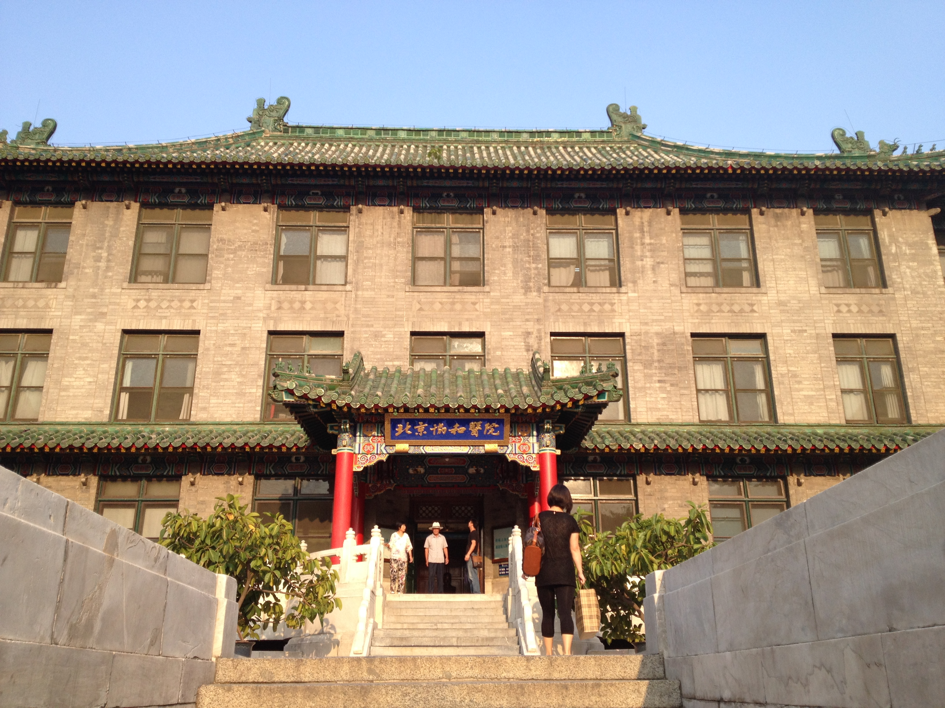 中文（中国大陆）: 原协和医学院，现北京协和医院（暨北京协和医学院）之——老楼，正门